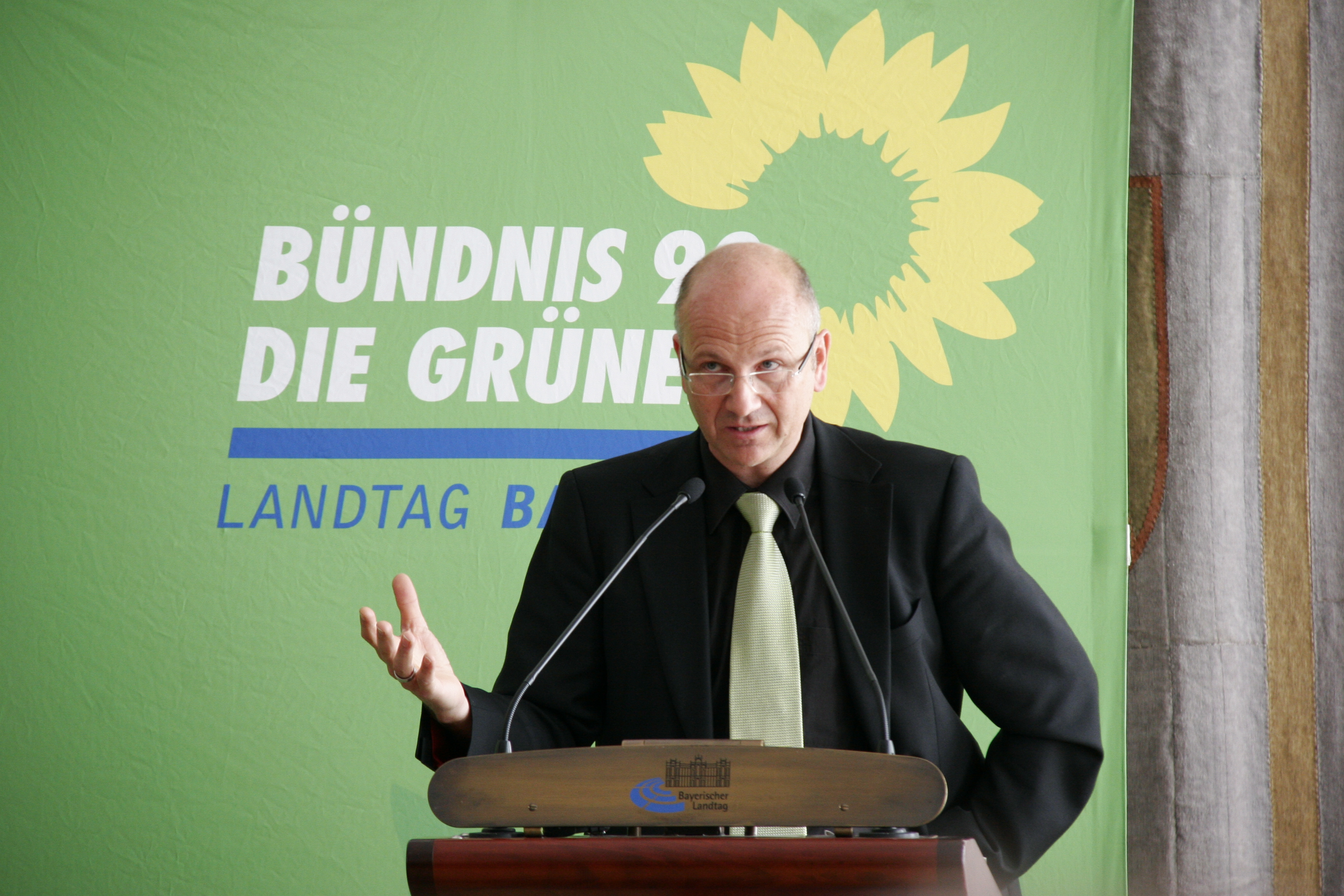 Kommunalpolitische Fachtagung 2011